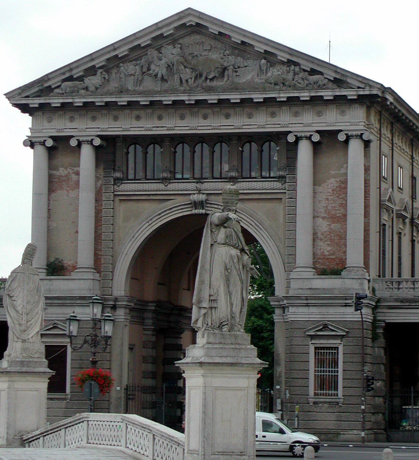 Il Foro Boario di Padova